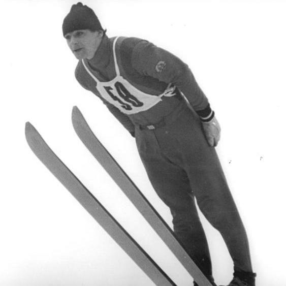 Zentralbild Demme 27.12.70 Oberhof: Sieger des Oberhofer Weihnachtssprunglaufes auf der Thüringenschanze wurde mit den Weiten von 80 und 81 Metern Manfred Wolf vom ASK Brotterode.